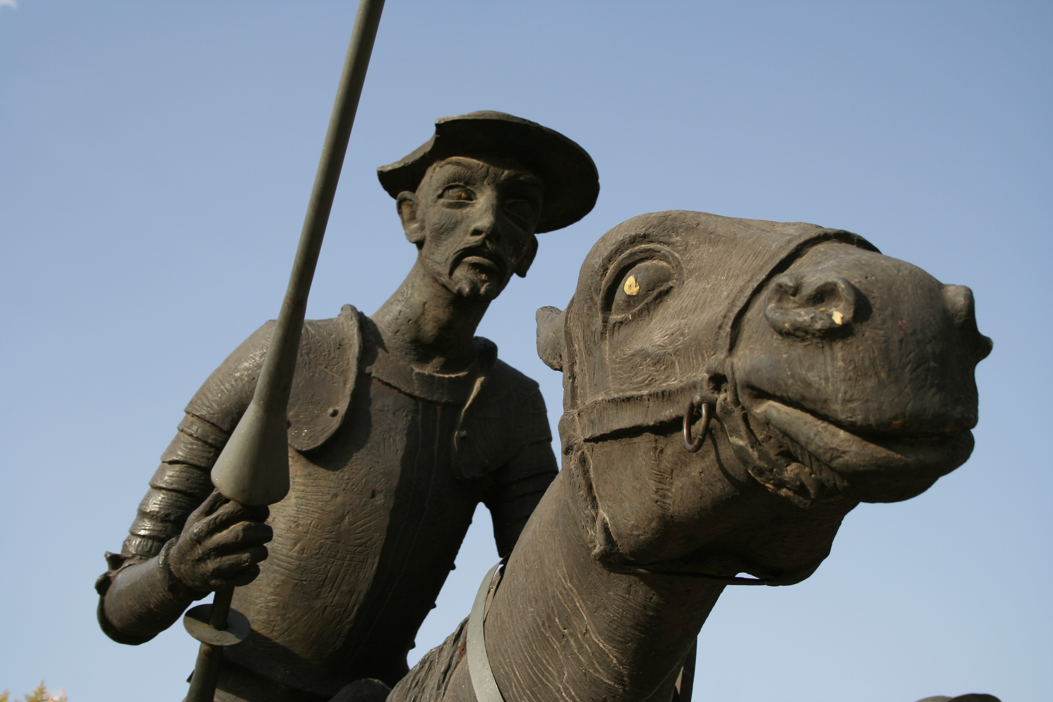 Detalle de Don Quijote de la estatua dedicada a Don Quijote y Sancho Panza, personajes de la novela El Ingenioso Hidalgo Don Quijote de la Mancha de Miguel de Cervantes